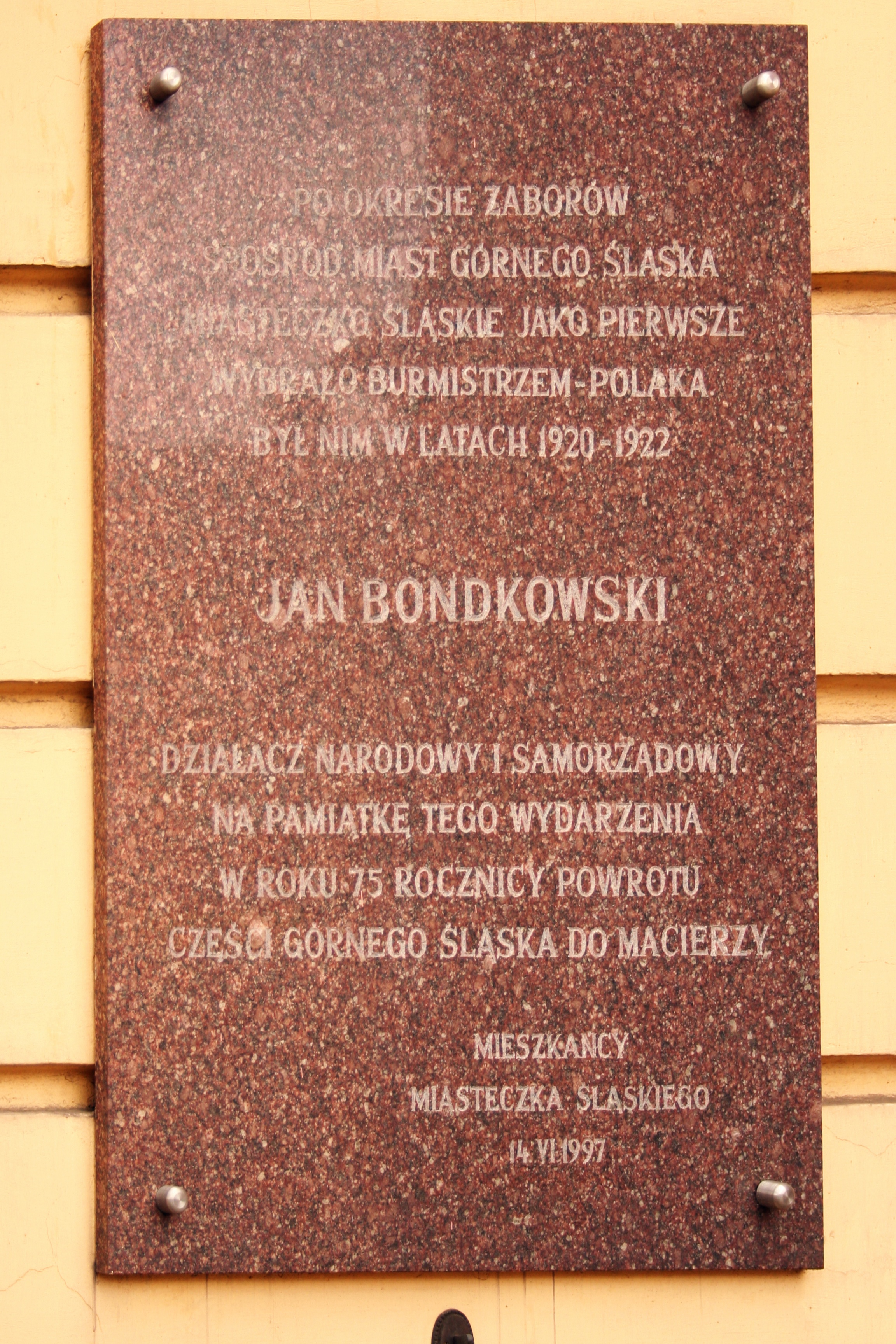 Pamiątkowa tablica na ratuszu w Miasteczku Śląskim, Polska, województwo śląskie, powiat tarnogórski